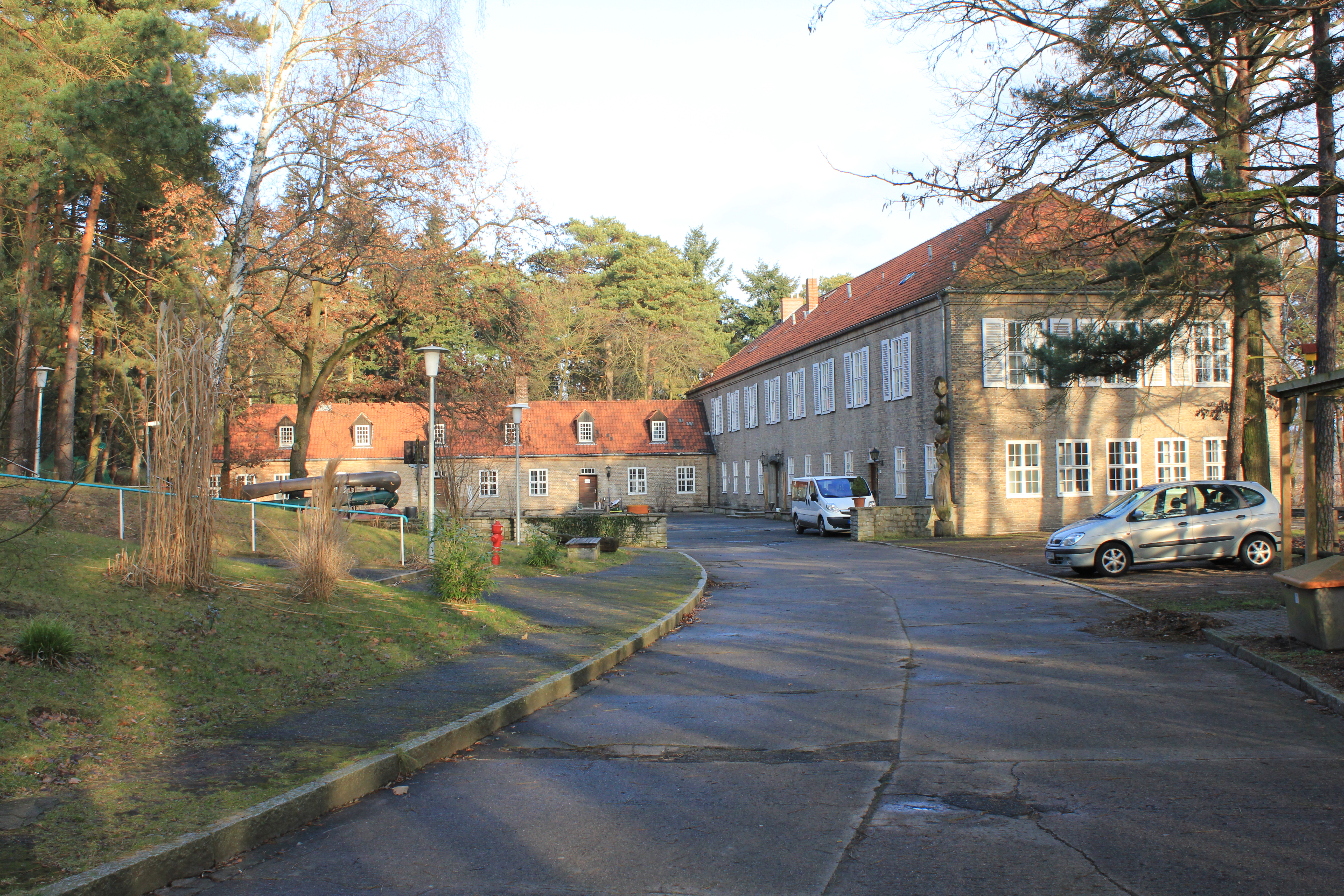 ehem. Auslandshaus der Hitlerjugend Jugendheim für ausländische Gäste mit Terrasse und Pavillon, 1937-38 von Fritz G. Winter